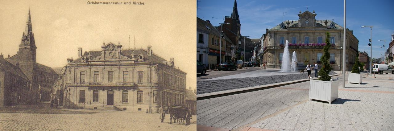 Photo 1 : La mairie de Caudry, faisant office de Kommandantur durant la Première Guerre Mondiale (Source : Wikipedia.de) Photo 2 : La mairie de Caudry aujourd'hui (Source : Own work) Own work, public domain. Travail placé dans le domaine public.